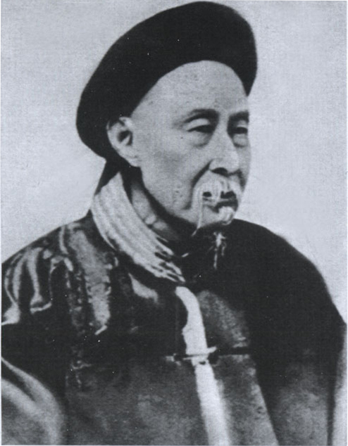 孙家鼐（1827年－1909年），字燮臣，号容卿、蛰生，别号澹静老人。安徽寿州人，晚清大臣。